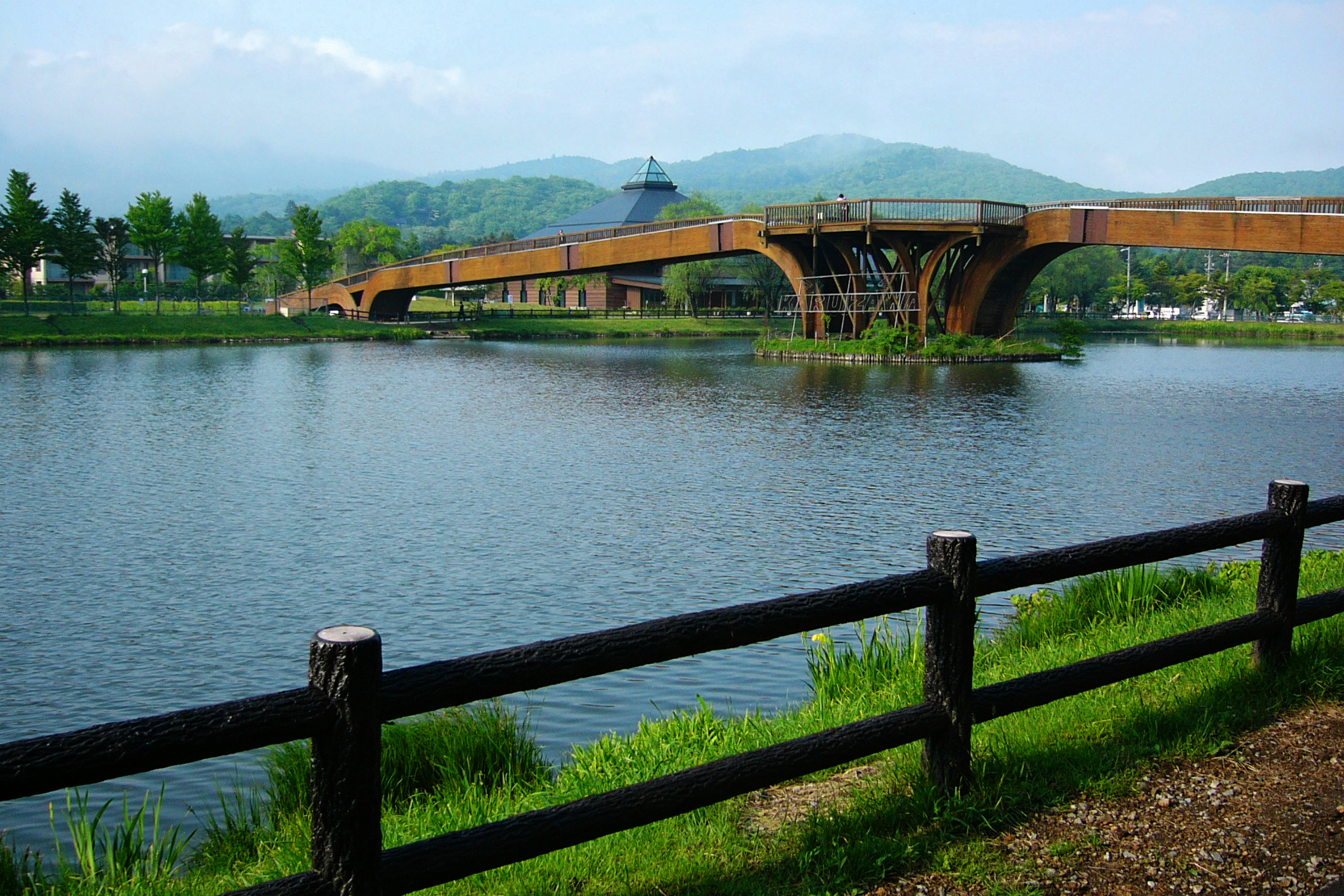 Yagasaki Park in Karuizawa, Japan